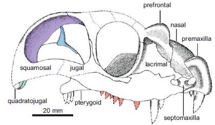 Tetraceratops insignis Matthew, 1908 (modified from Laurin and Reisz 1996). The quadrate is colored in green, epipterygoid in blue, upper postcanines in orange, and upper margin of the temporal fenestra in purple.